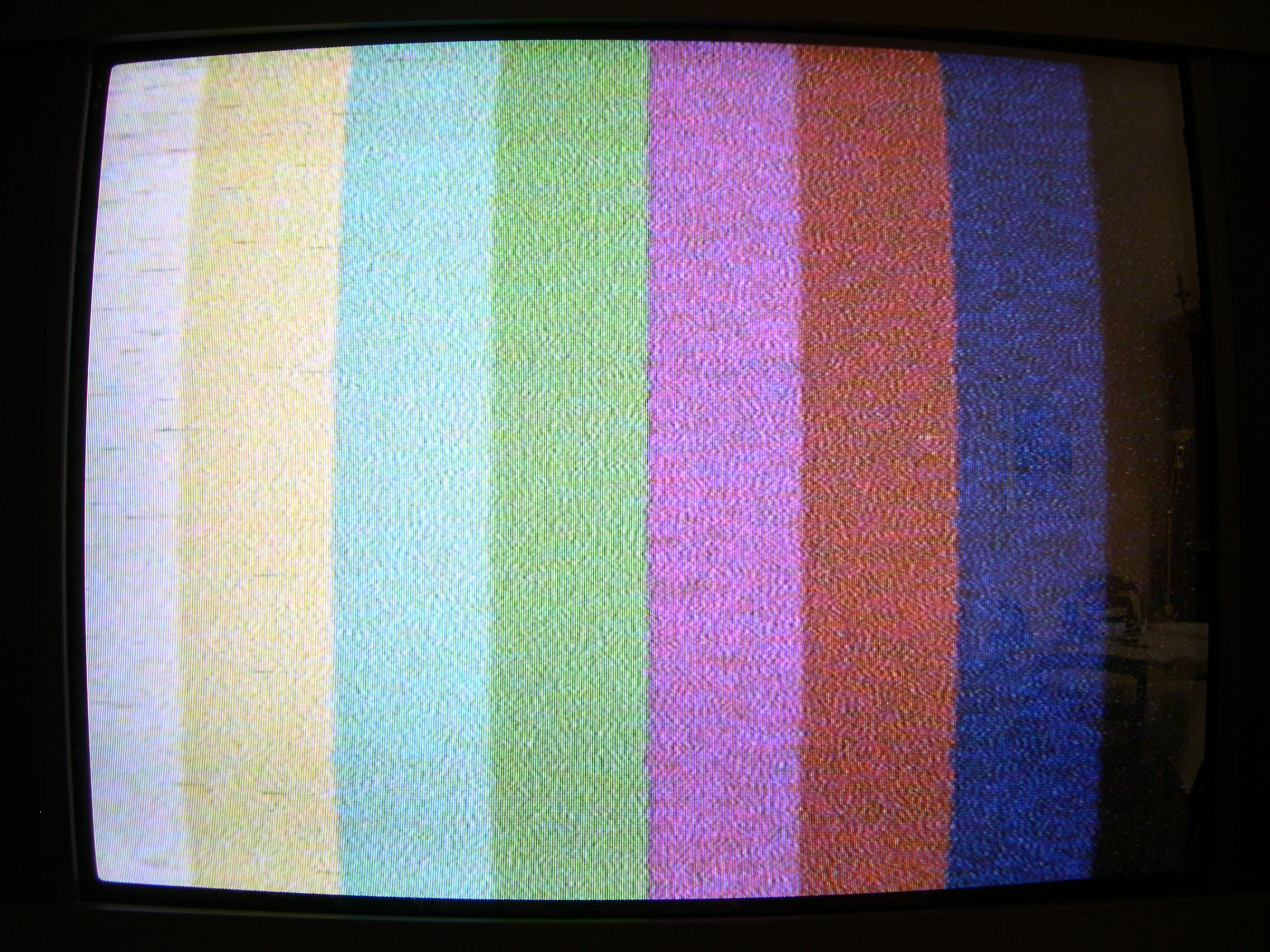 Reception bande 2.4 GHz ISM avec préamplificateur d'antenne à faible bruit. On remarque une nette amélioration de l'image par rapport l'illustration " Preamplifm1.jpg." et à titre de comparaison, bien plus qu'en modulation d'amplitude traditionnelle connue en tv analogique terrestre. Toutefois il subsiste quelques clics et une certaine présence de bruit.